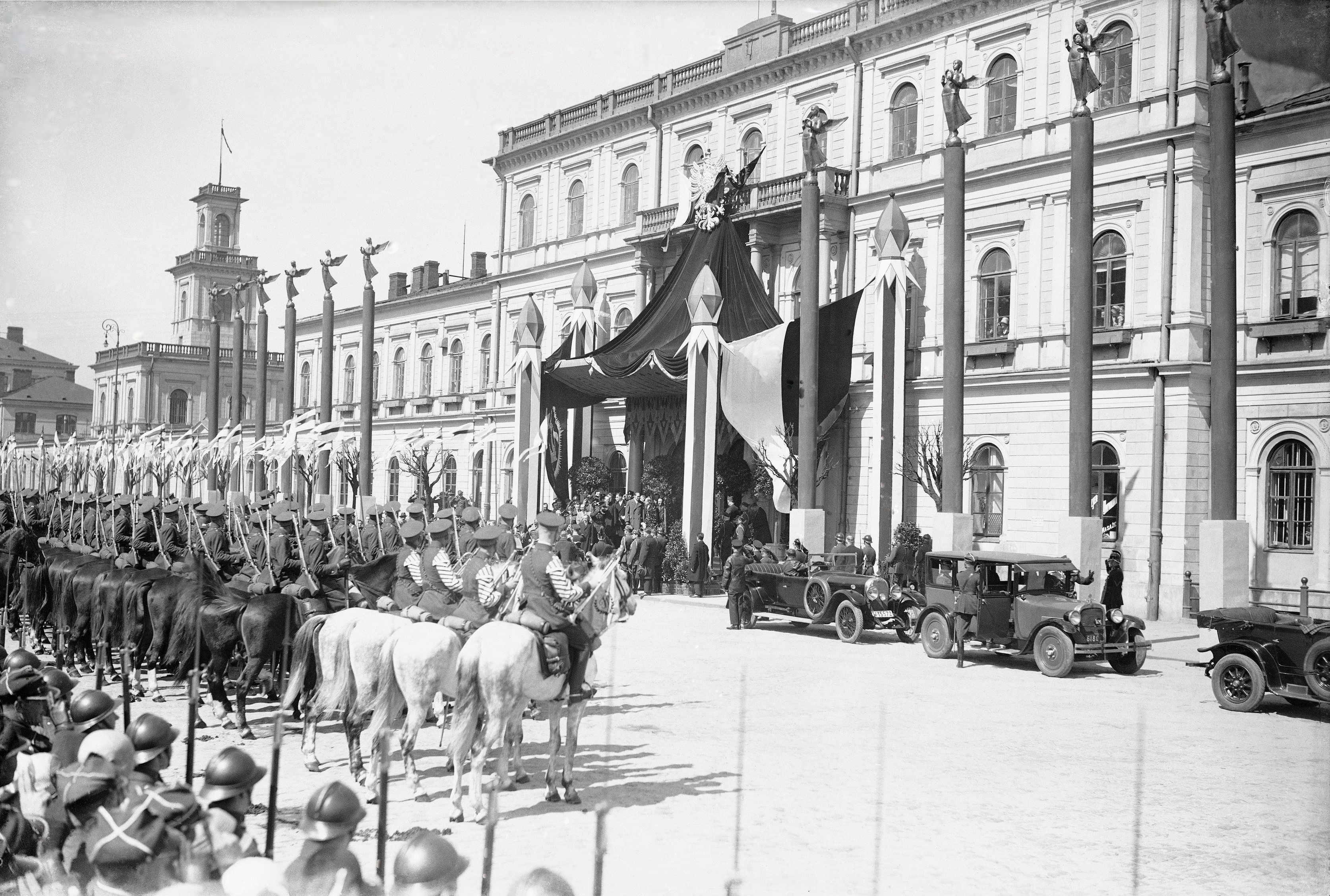 1 Pułk Szwoleżerów oraz oficjalna delegacja w oczekwianiu na powitanie króla przed udekorowanym Dworcem Wiedeńskim.